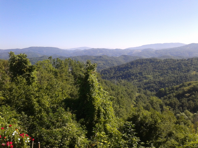 Panoramica da Villa Romana di Carsoli